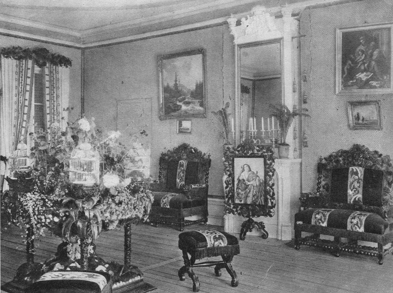 Brunnshuset Vårby källa omkring år 1900, stora salen vån. 1 tr